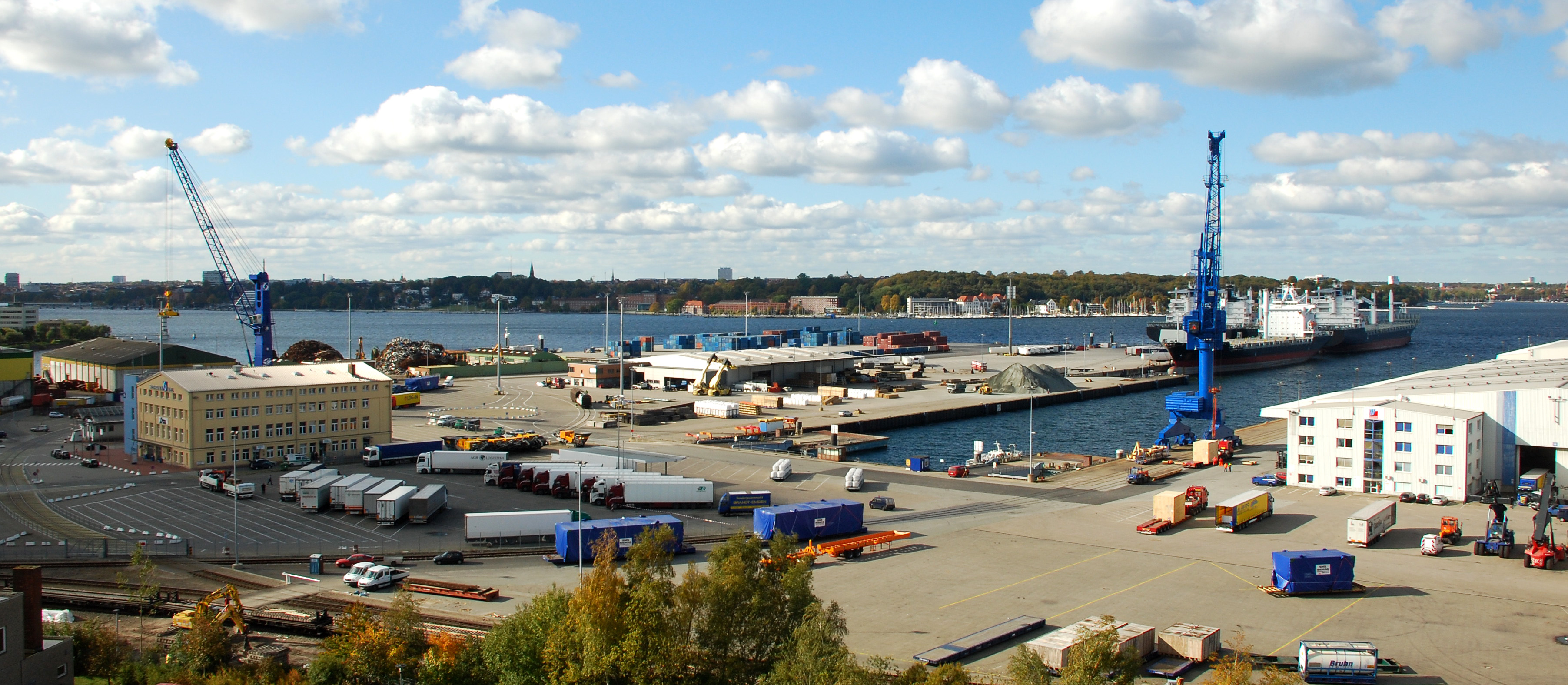 Kieler Ostuferhafen (vom Hochhaus der FH Kiel aus fotografiert)